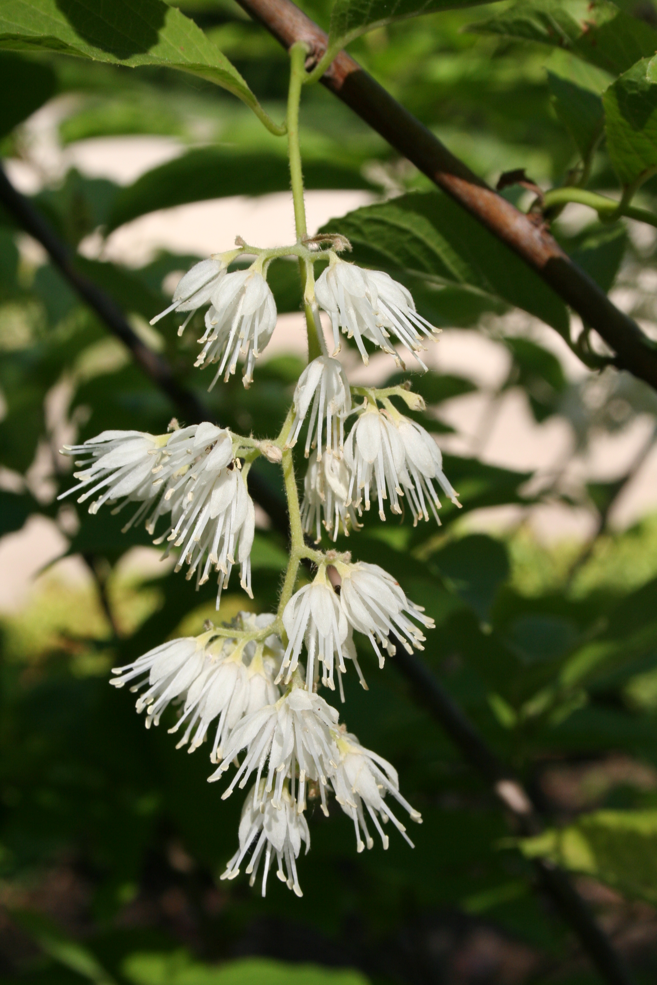 Pterostyrax hispida. Real Jardín Botánico, Madrid